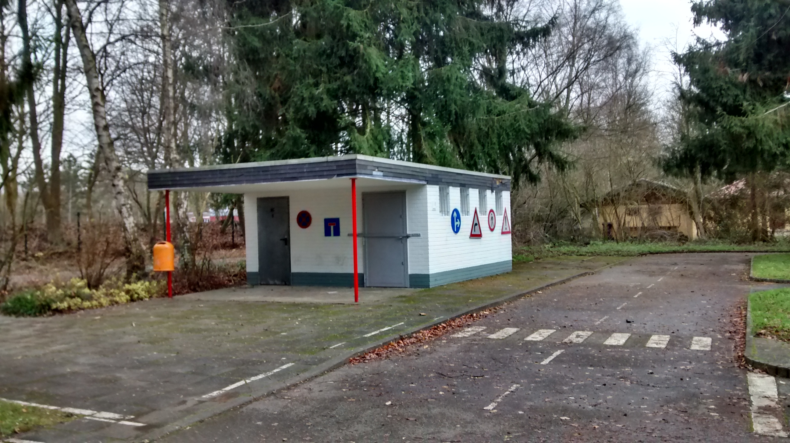 Impressionen aus der südöstlichen Umgebung des Blausteinsees und des Naherholungsgebiets Dürwiß vom Dezember 2014.